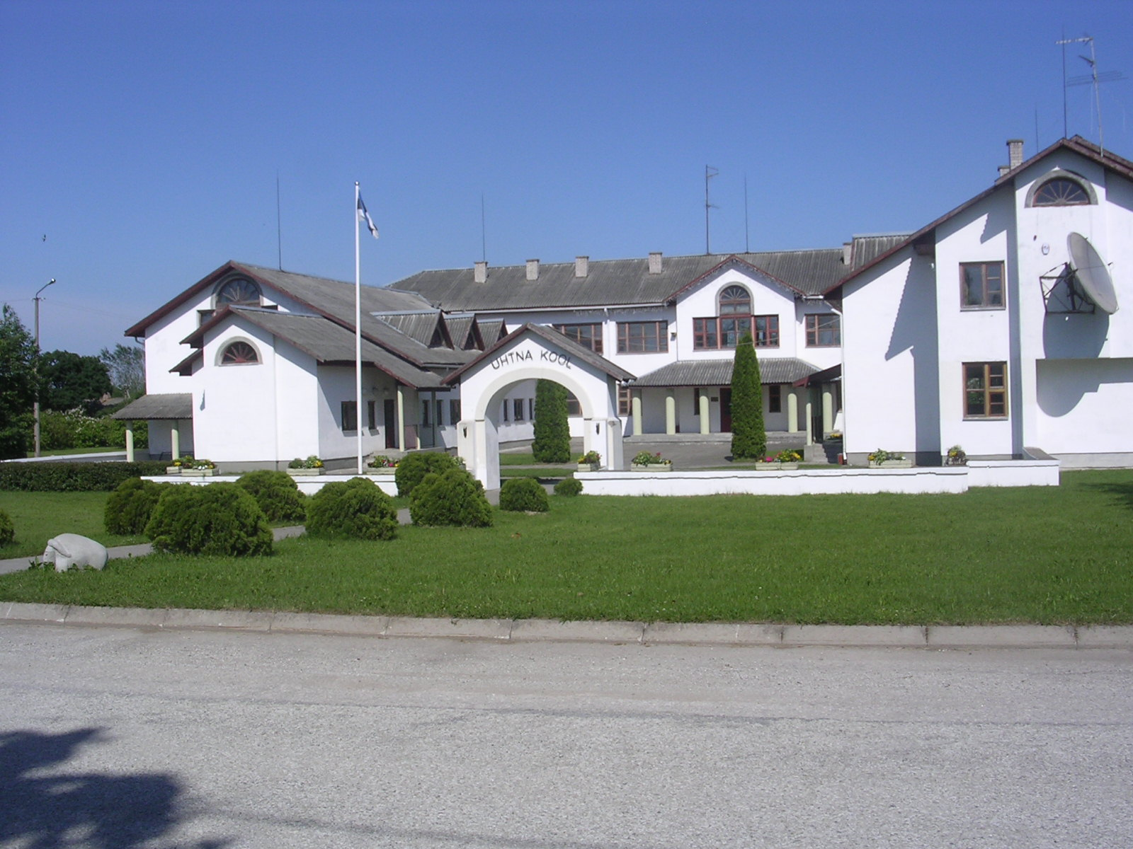 Uhtna kool